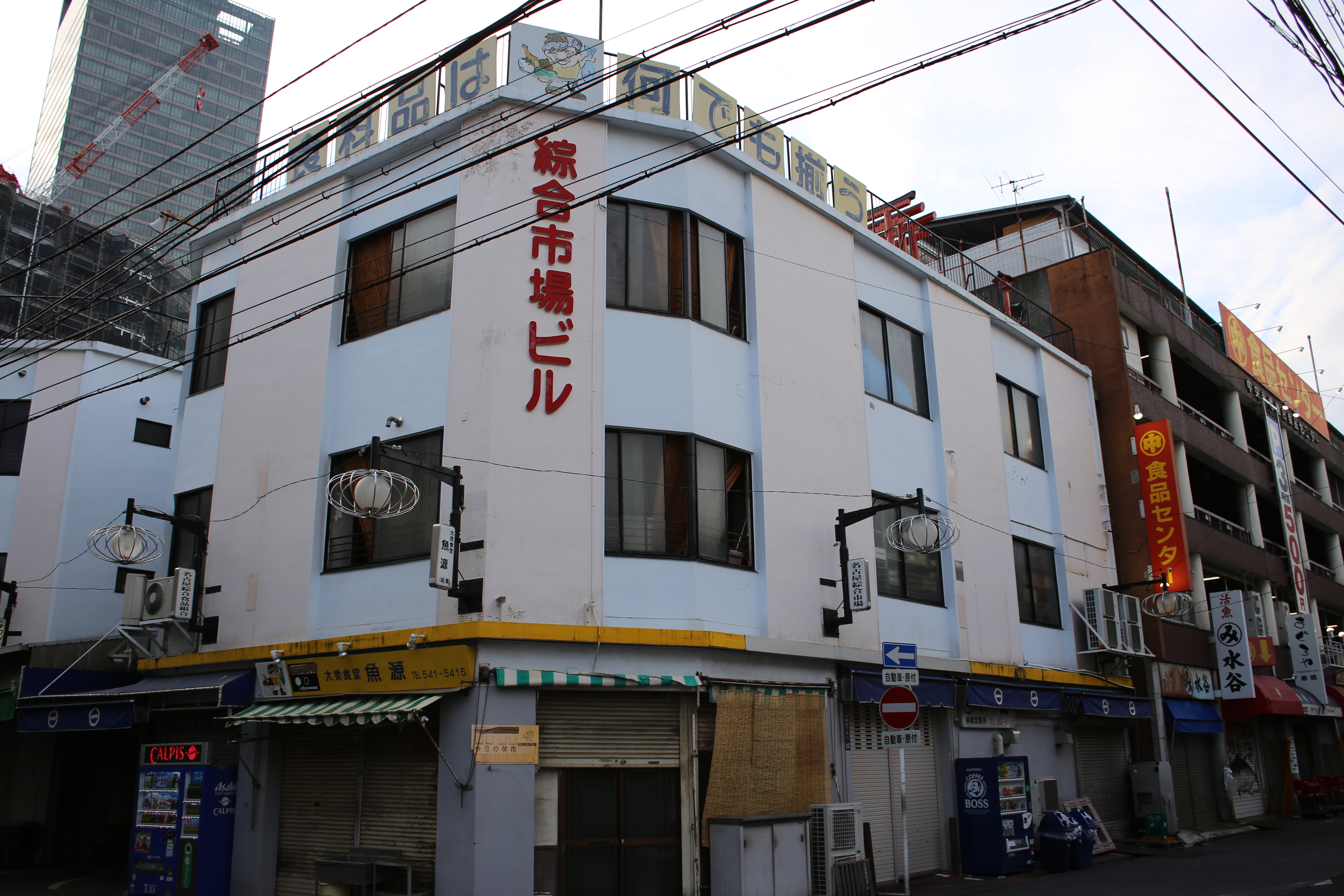 名古屋市中村区名駅四丁目の名古屋綜合市場ビルを東側公道南側より撮影